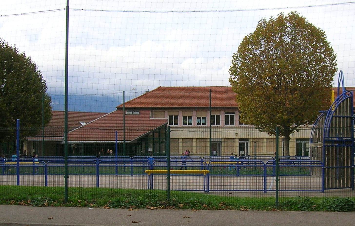 école primaire Jean Mermoz et terrain de basket à Poisat, Isère, Rhône-Alpes, France.